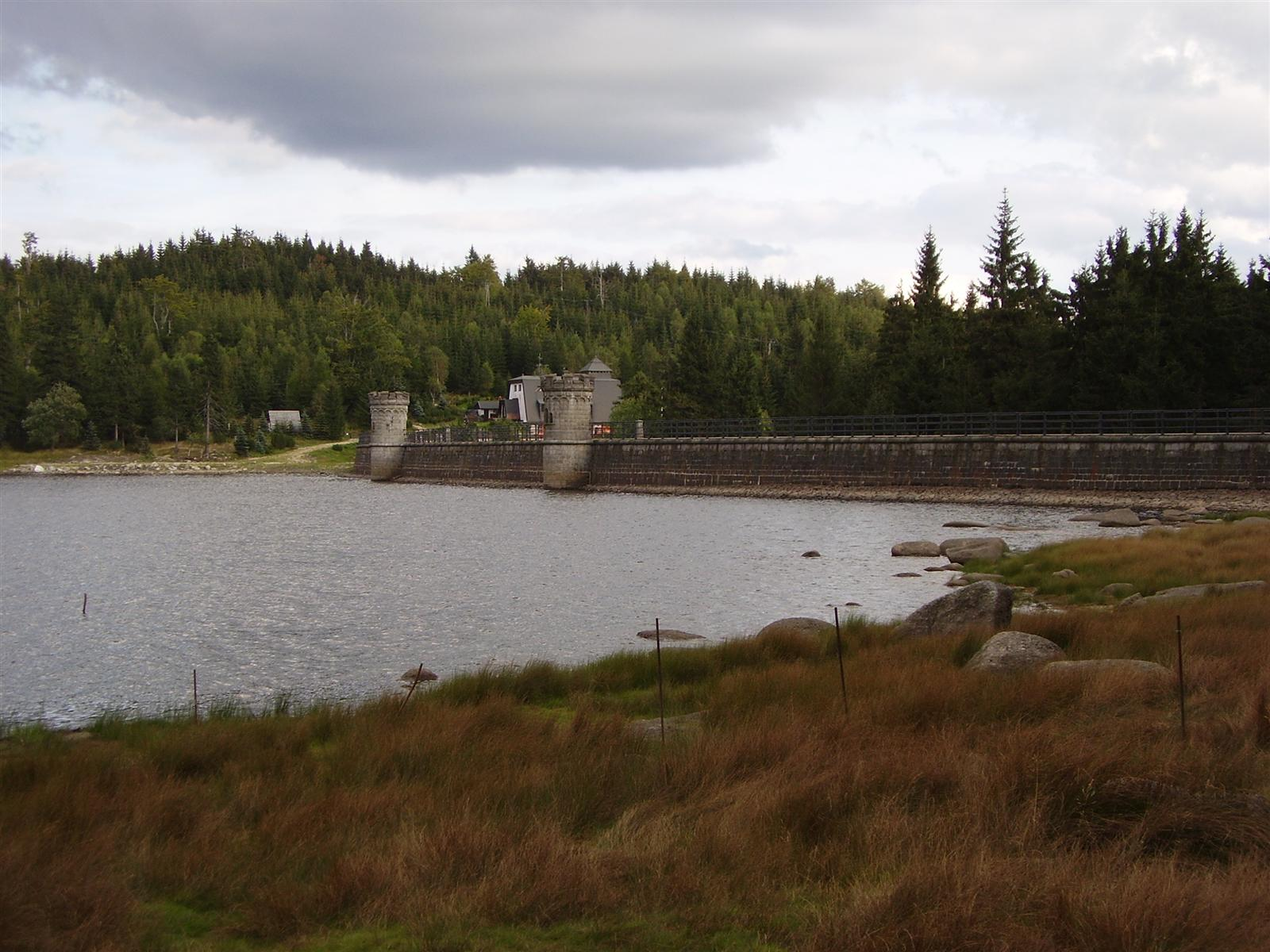 Pohled přes vodní plochu a na hráz přehrady Bedřichov v Libereckém kraji